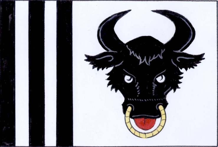 vlajka,Velké Tresné , okres Žďár nad Sázavou